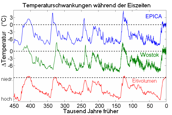 Dies ist die deutsche Übersetzung des Bildes und der Bildbeschreibung aus dem Englischen. Dieses Bild zeigt die antarktischen Temperaturänderungen während einiger der letzten Zyklen von Kalt- und Warmzeiten des jetzigen Eiszeitalters und einen Vergleich mit Änderungen des globalen Eisvolumens. Heute ist auf der rechten Seite des Diagramms.